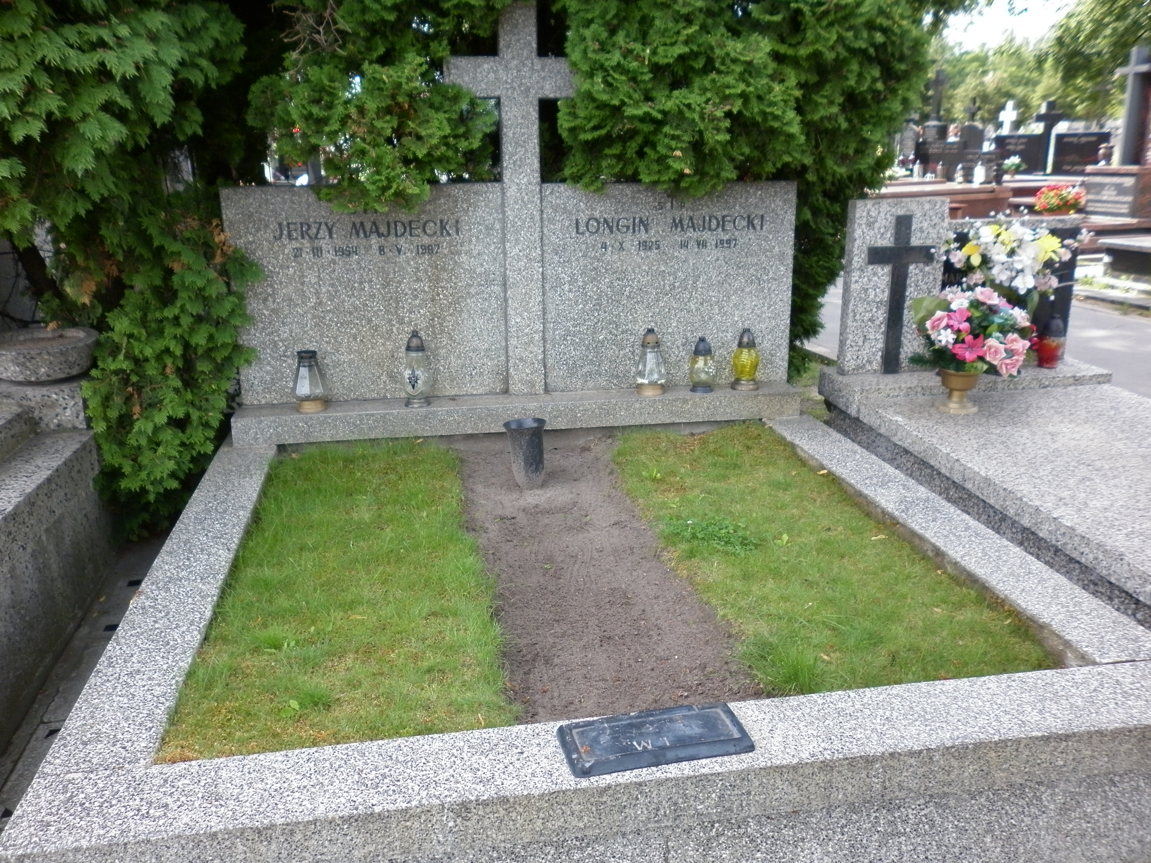 GróbLongina Majdeckiego na cmentarzu przy ulicy Renety